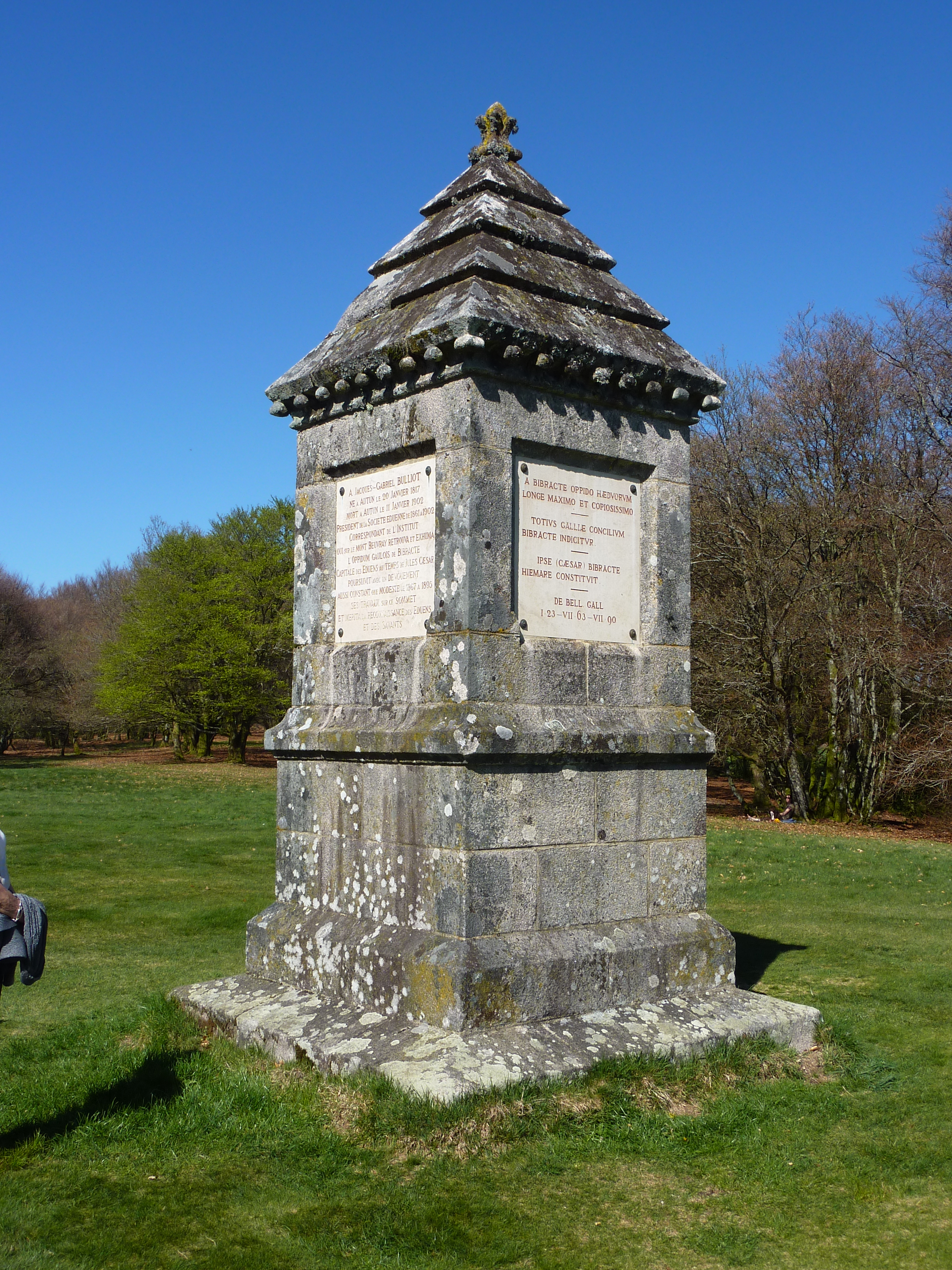 Mont Beuvray : monument commémorant Bibracte